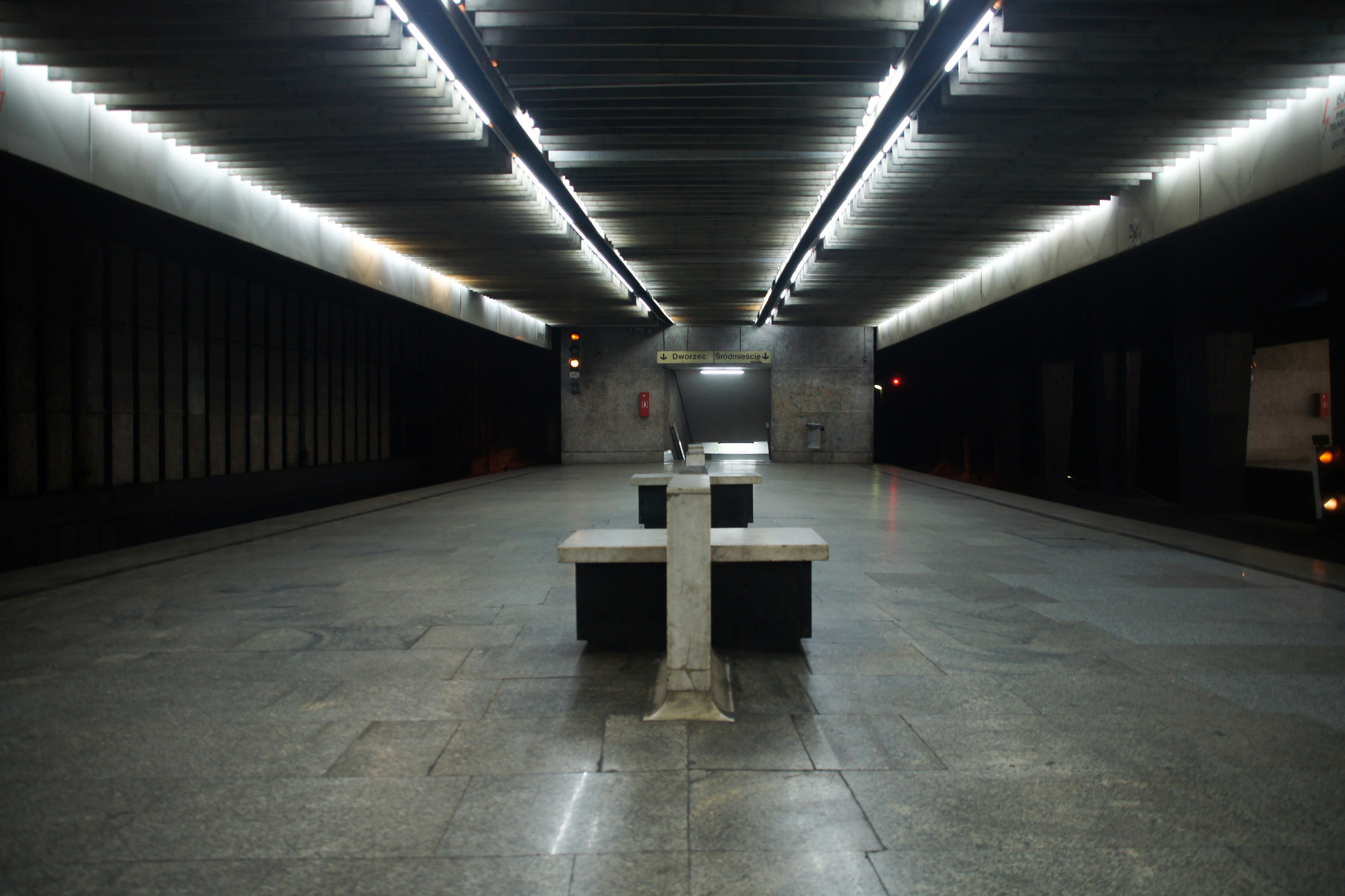 PKP Warszawa Centralna - widok na wschodni końcowy odcinek peronu 4 oraz przejście na PKP Warszawa Śródmieście